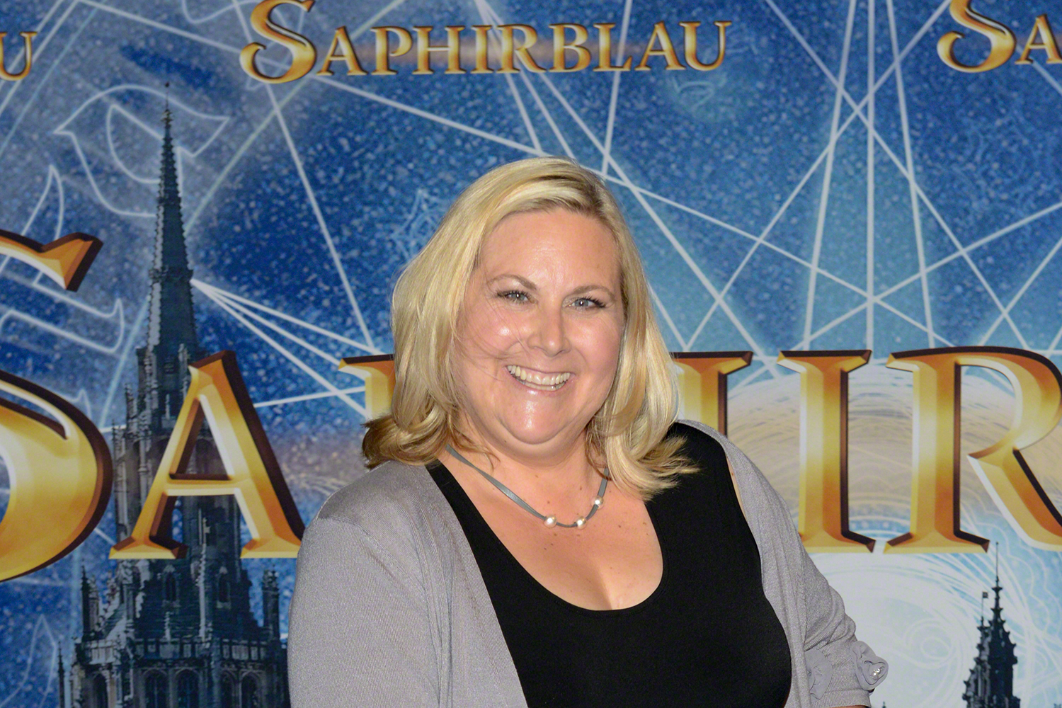 Kerstin Gier auf der Deutschlandpremiere des Films "Saphirblau" im Cinedom Köln am 11. August 2014.